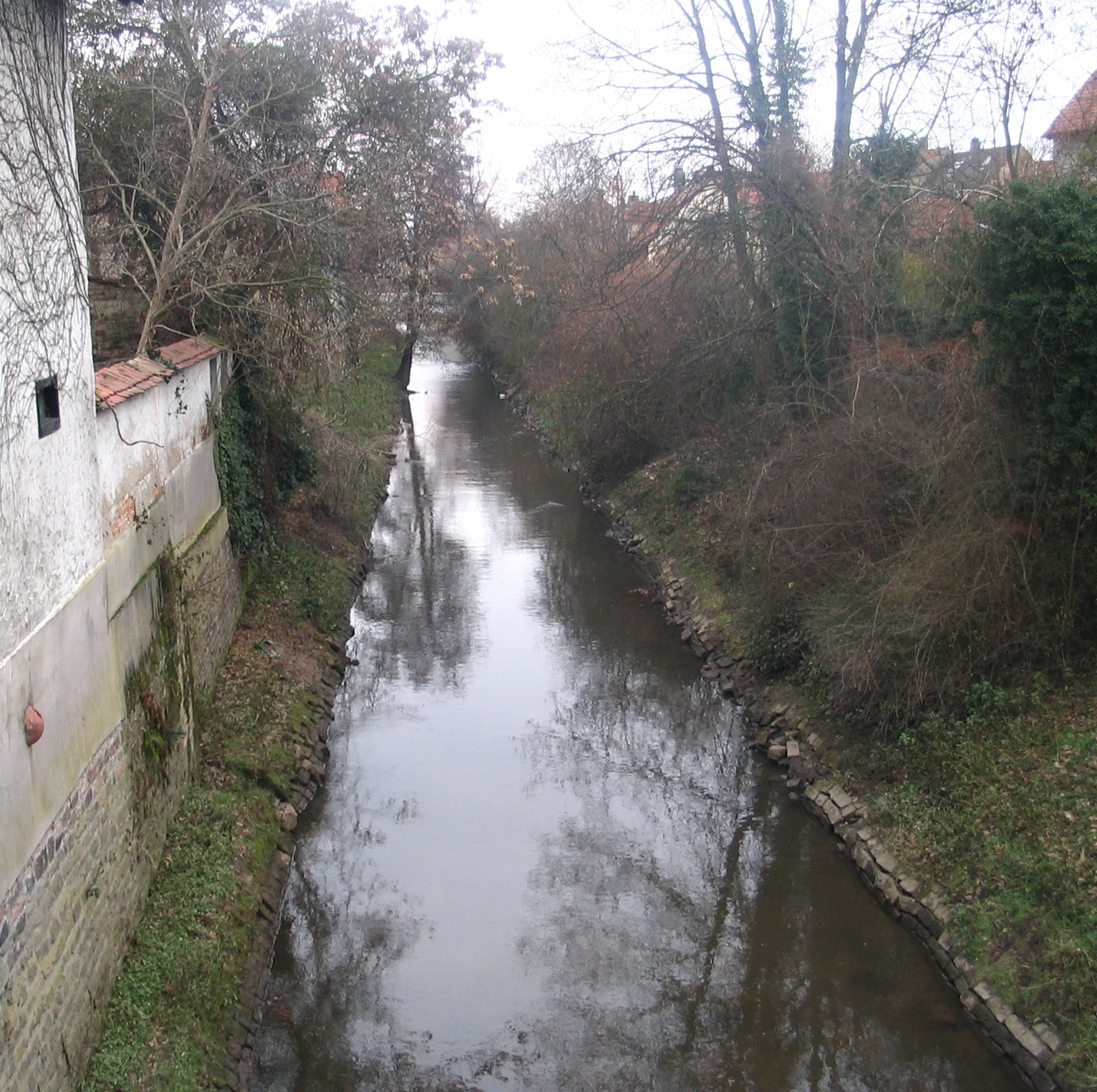 Speyerbach in der Ortslage von Speyer